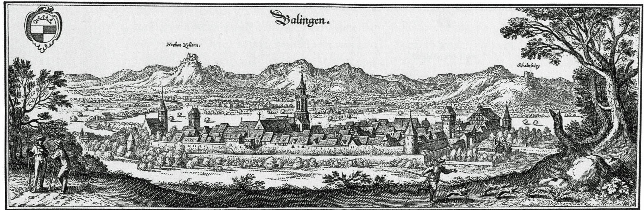 Balingen mit Burg Hohenzollern und Schalksburg Kupferstich